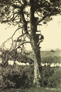 Беларуская (тарашкевіца): Калоднае бортніцтва ў Слуцкім павеце